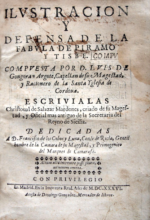 Portada de la obra de Cristóbal Salazar Mardones, Ilustración y defensa de la Fábula de Píramo y Tisbe compuesta por don Luis de Góngora y Argote, Madrid, en la Imprenta Real, a costa de Domingo González..., 1636. Reproducción digital en Alicante, Biblioteca Virtual Miguel de Cervantes, 2003.